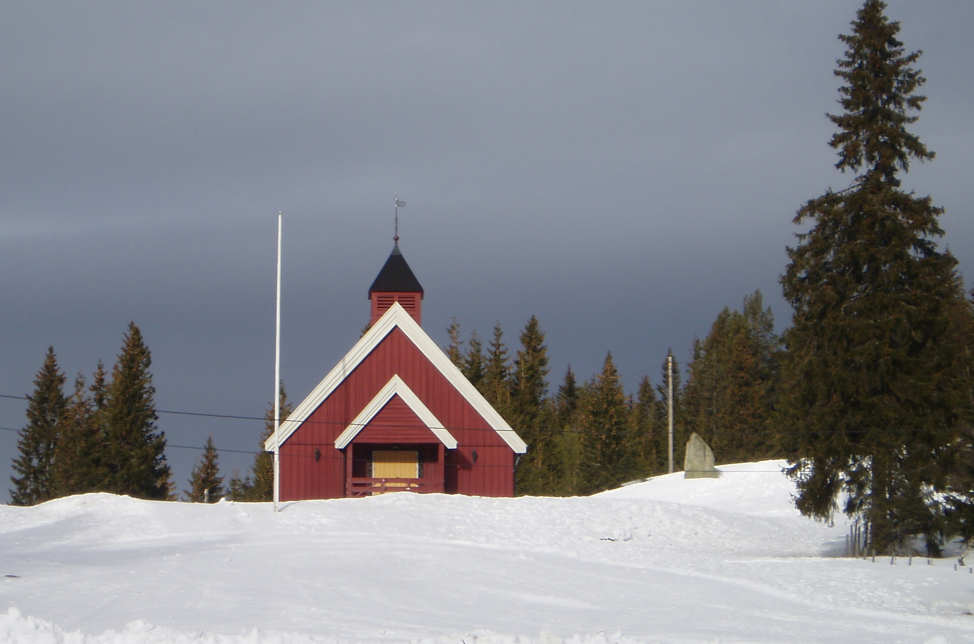 Ringkollen kapell